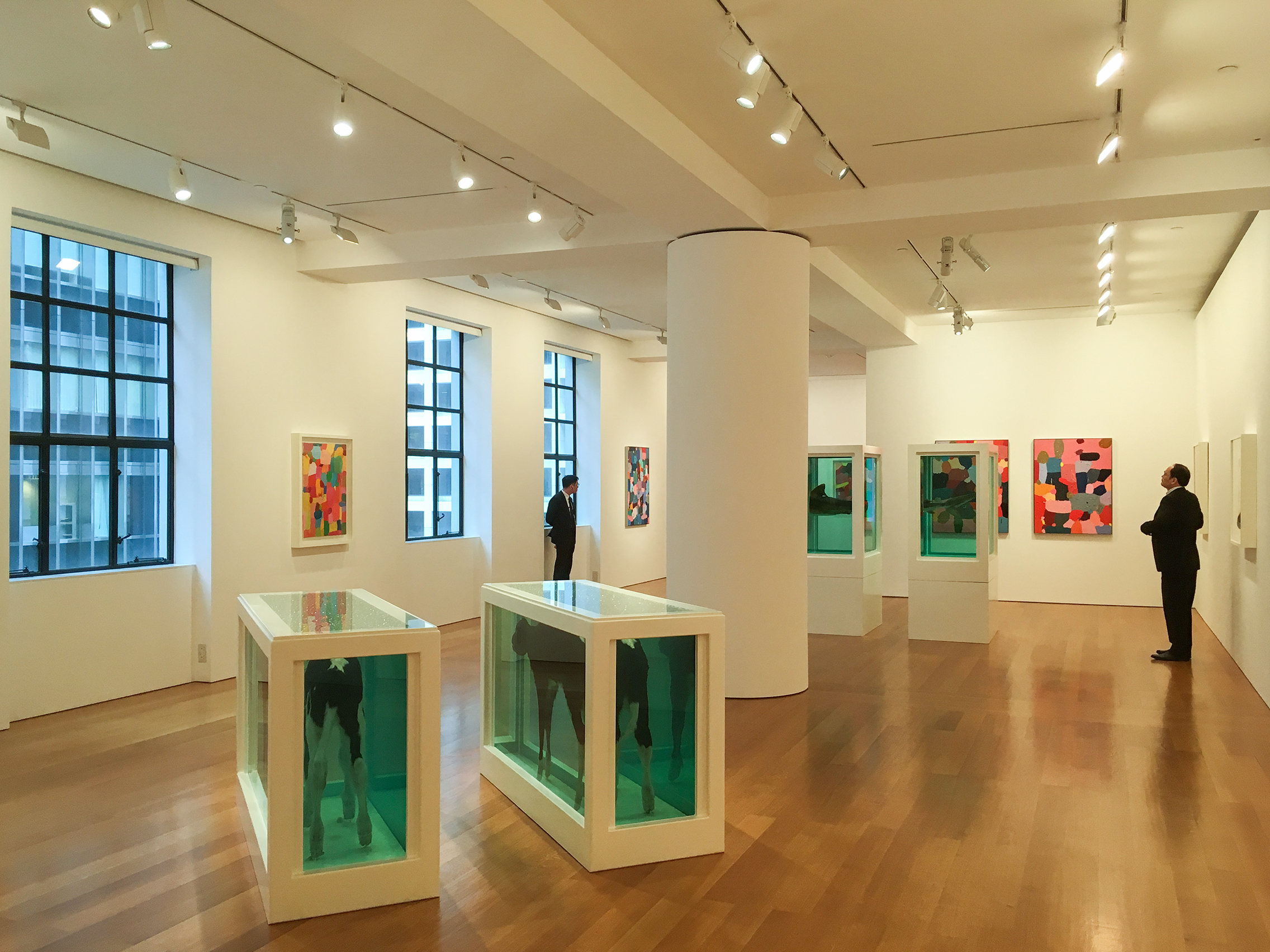 Gagosian Hong Kong